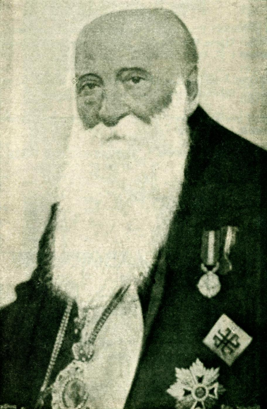 Roman (Romulus) Ciorogariu (n. 6 decembrie 1852, Pecica, Arad - d. 21 ianuarie 1936, Oradea) a fost un episcop român, membru de onoare al Academiei Române.